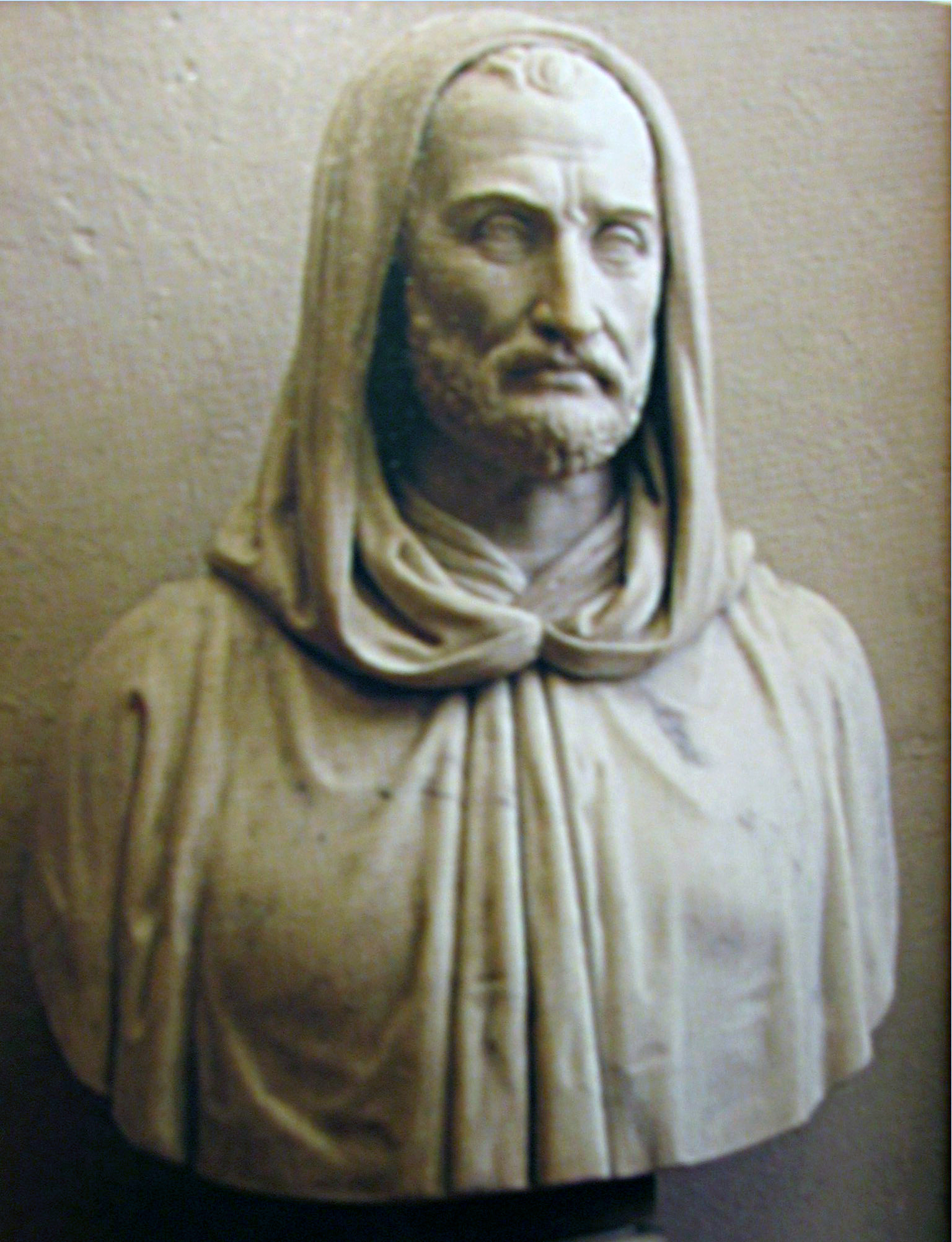 Busto di Ambrogio Calepio, Biblioteca civica Angelo Mai, Bergamo, Italia, Sculptor: Gaetano Matteo Monti, cf. Erminio Gennaro: Il mito di Ambrogio da Calepio. In: Maria Mencaroni Zoppetti, Erminio Gennaro (ed.): Società, cultura, luoghi al tempo di Ambrogio da Calepio. Bergamo 2005, p. 460; Scheda Biblioteca A. Mai